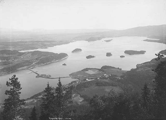 Kroksundet og Steinsfjorden sett frå Kongens utsikt. Sundvollen.